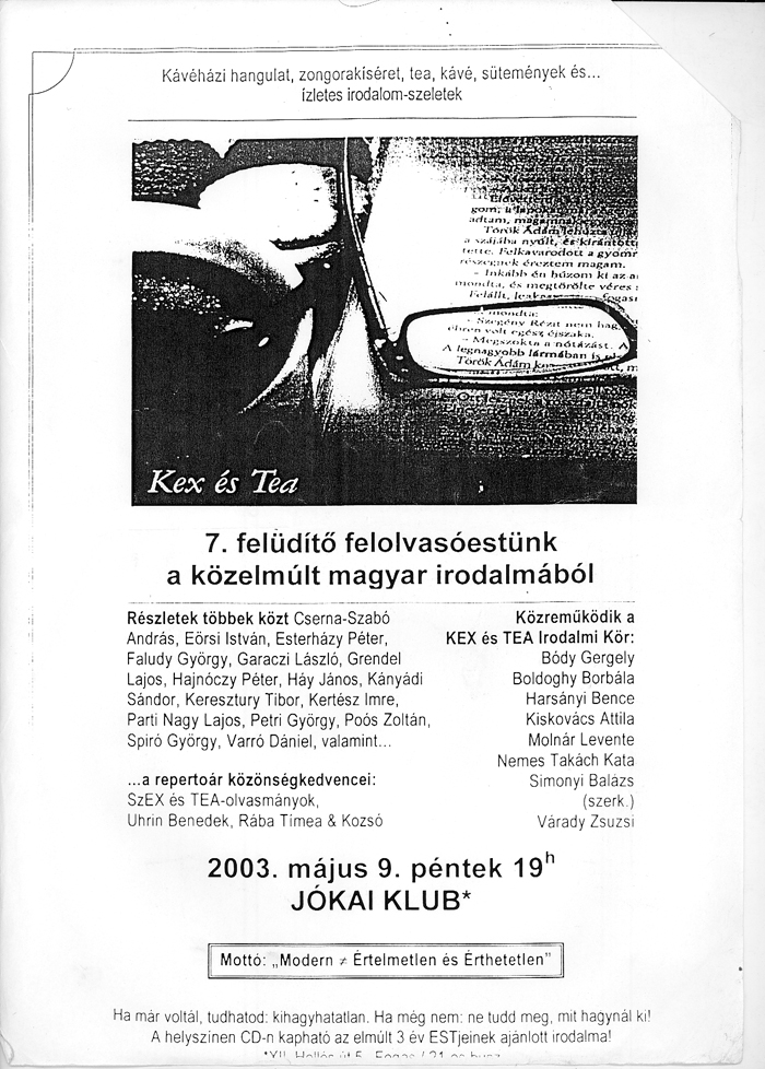 A Kex és Tea irodalmi kör egykori szórólapja (Jókai Klub, Budapest)